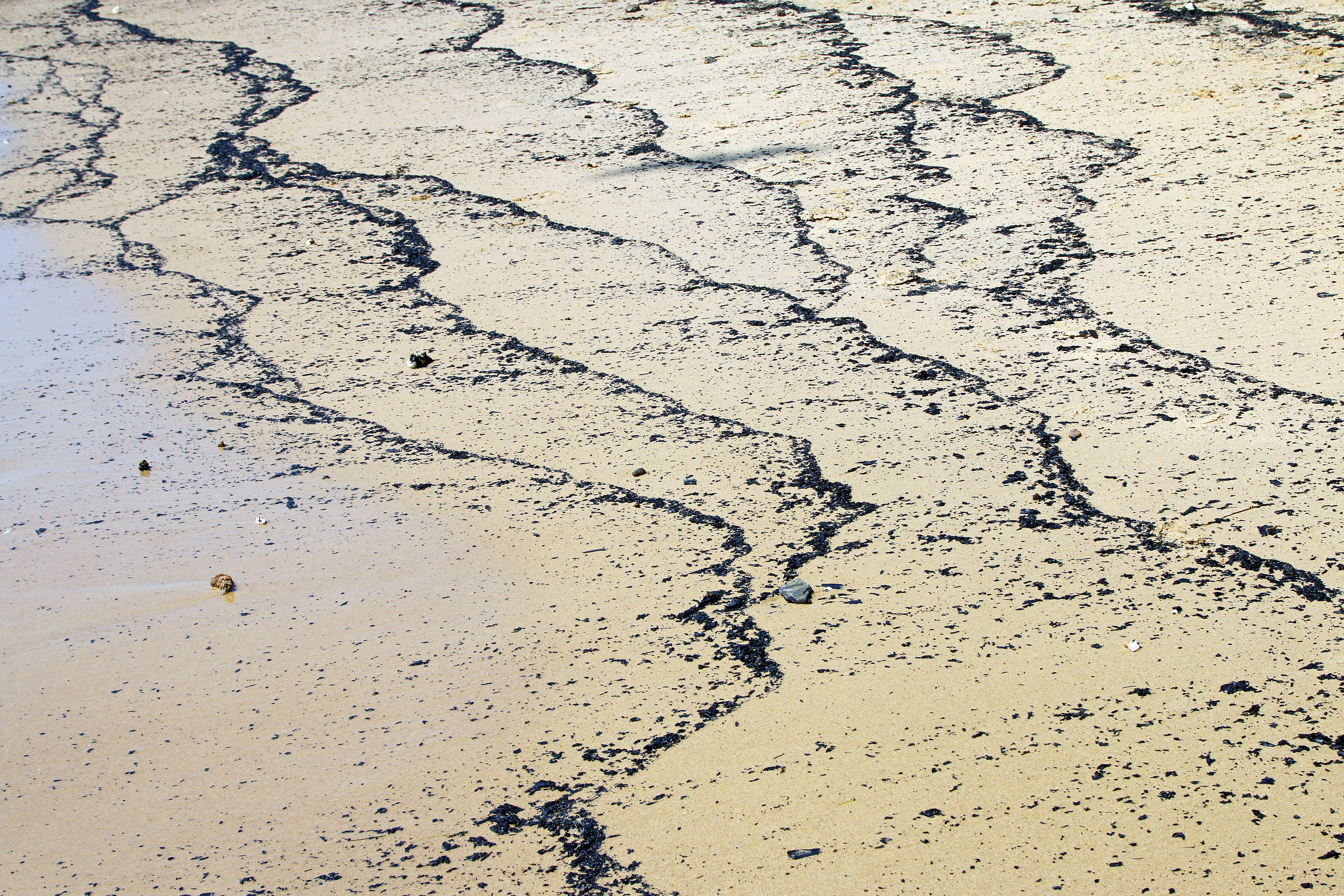 EOS3 4634 19 12